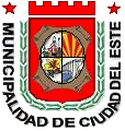 Escudo de Ciudad del Este